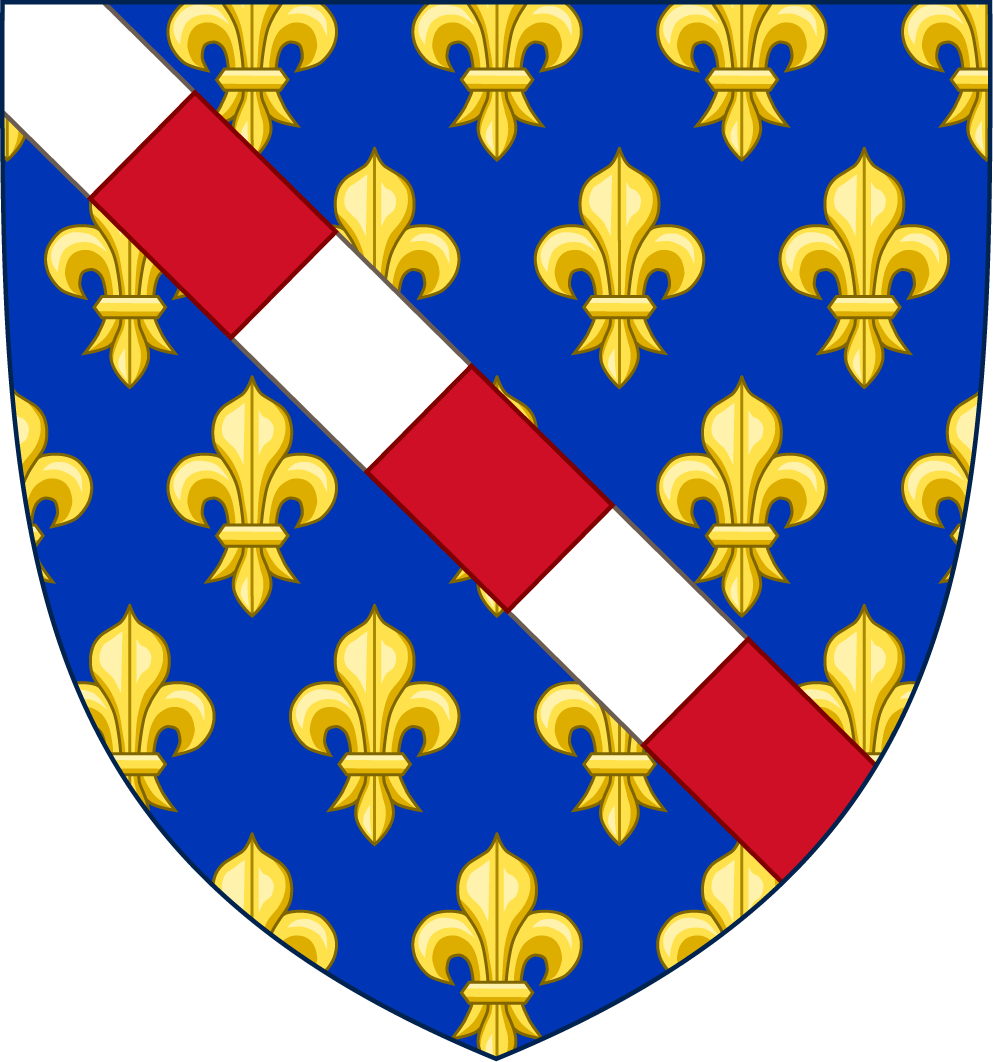 Blason de Louis de France, comte d'Evreux.